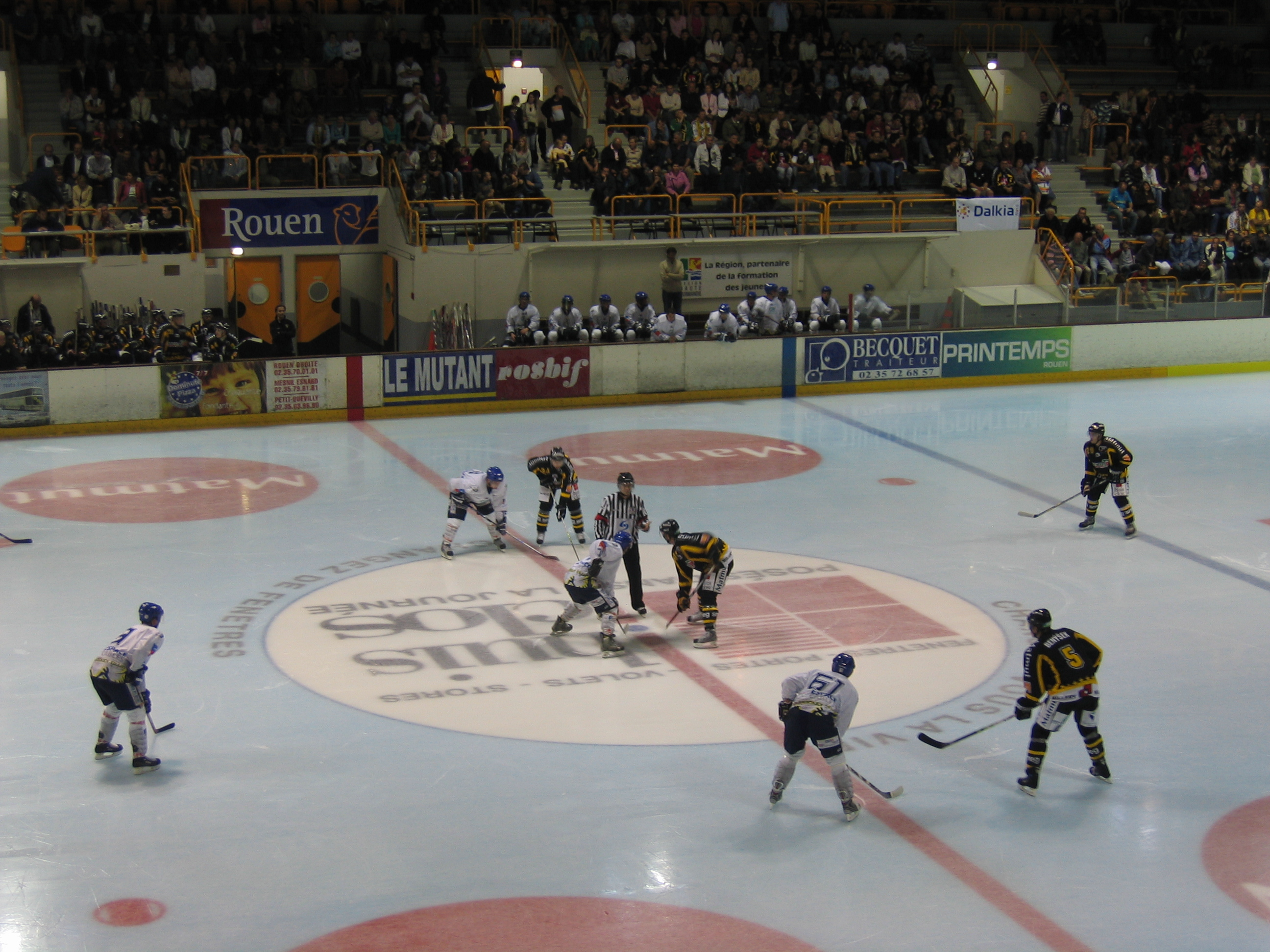 3e journée de la Ligue Magnus 2007-08, Rouen affronte Dijon à l'Ile Lacroix